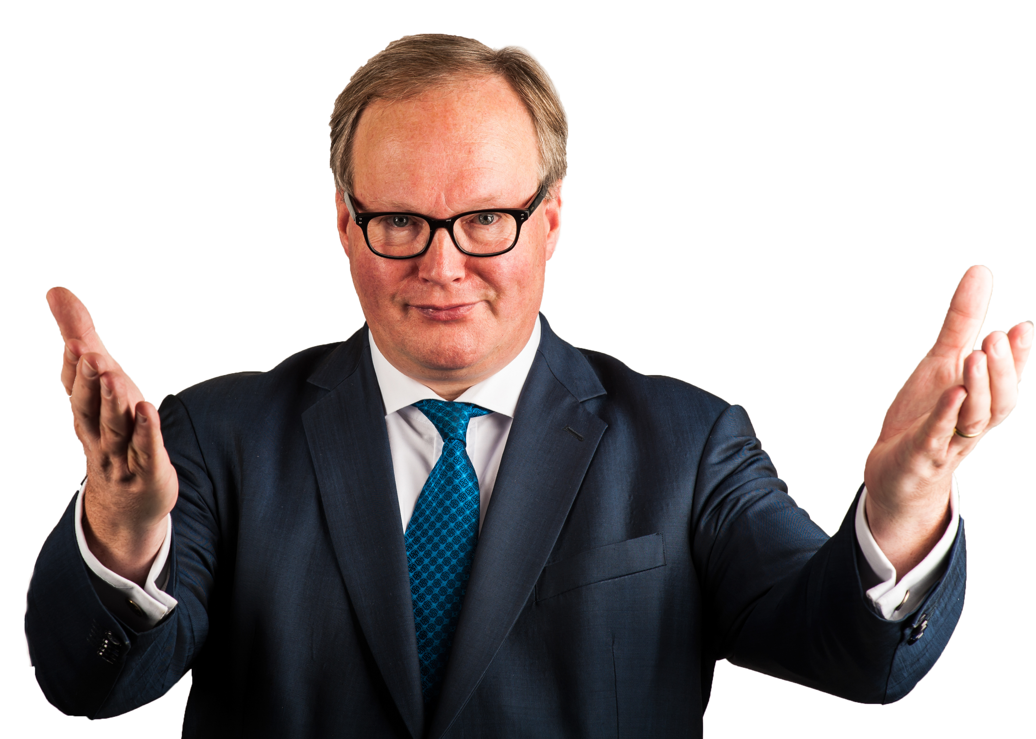 MEP Hans van Baalen